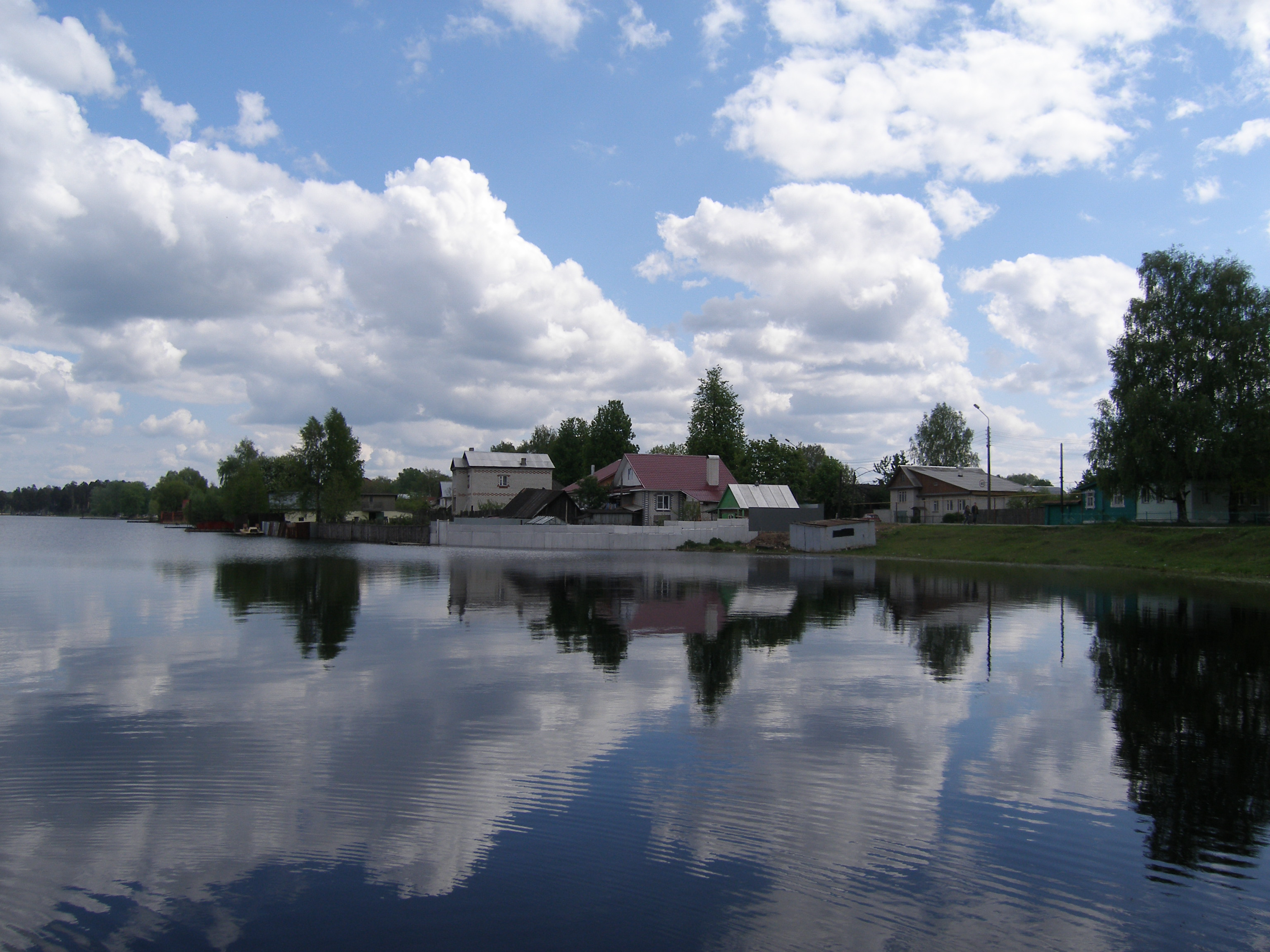 Выкса, Дома у пруда